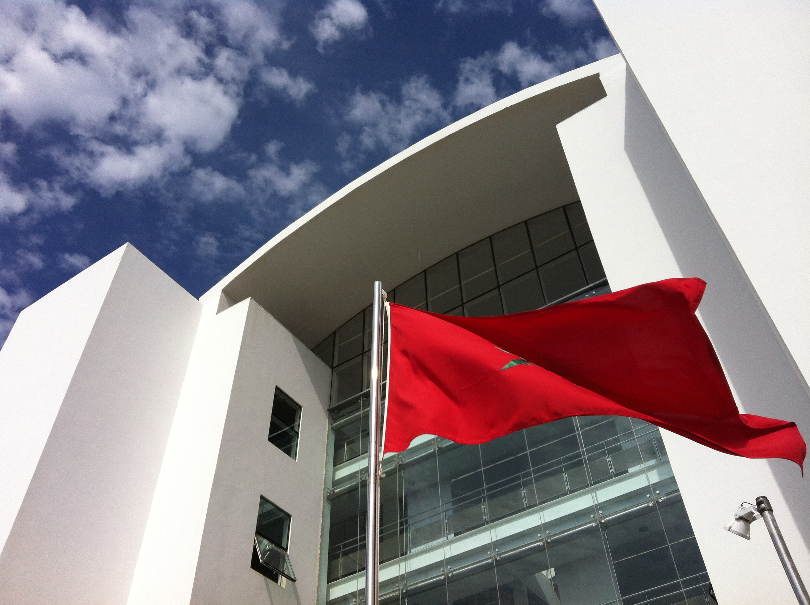 L'entrée de l'UIR